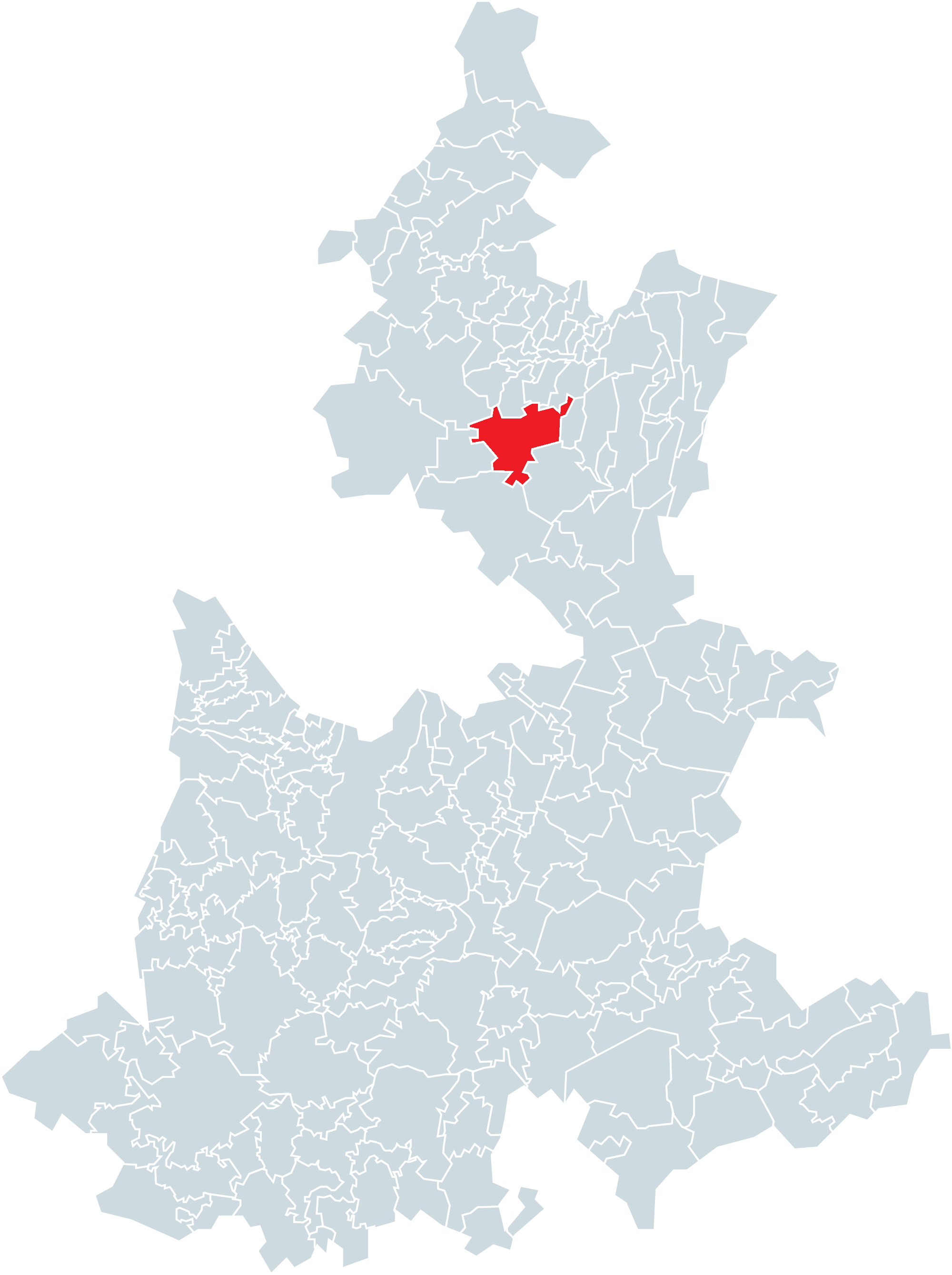 Municipio de Tepetzintla